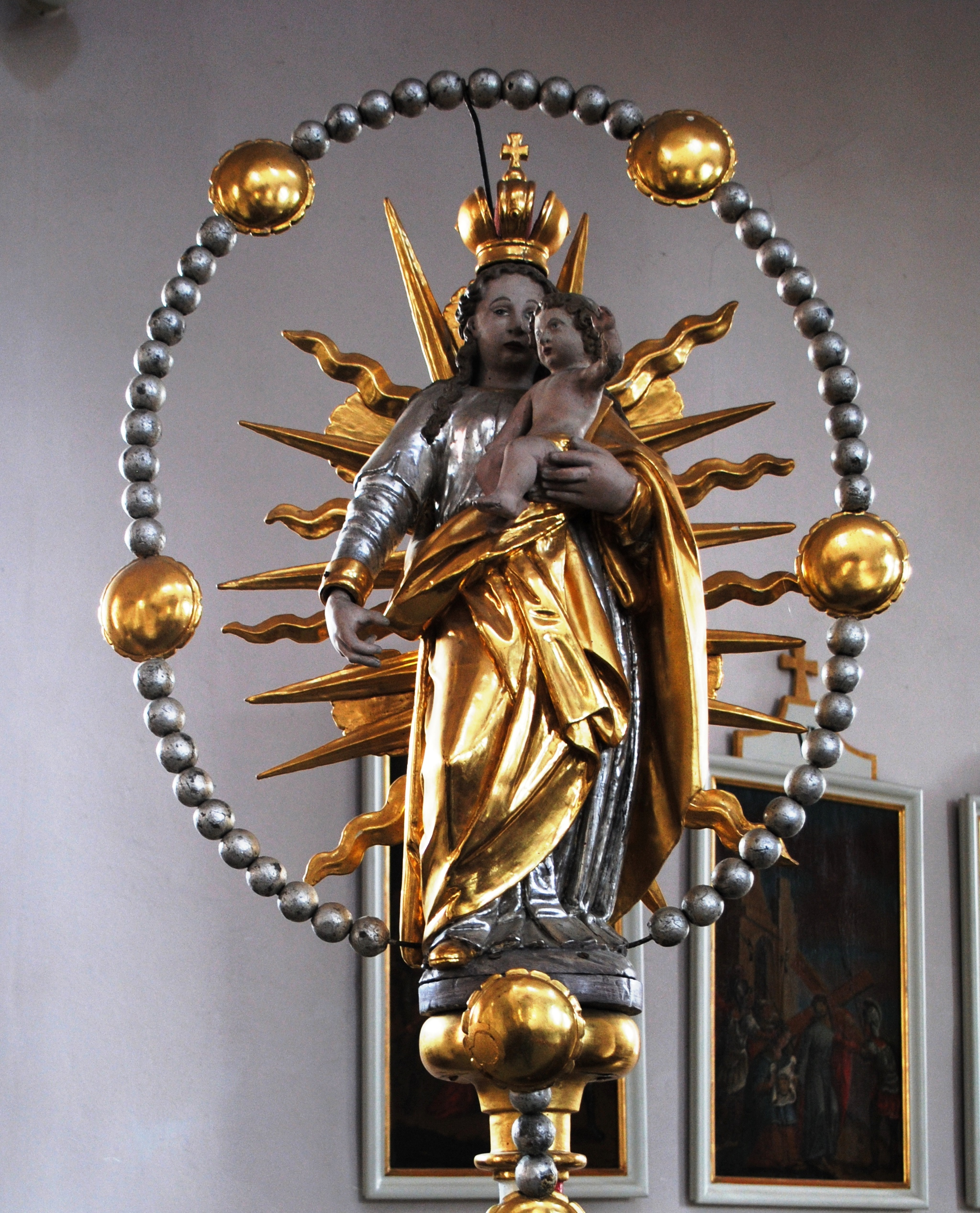 Tragestange der Rosenkranzbruderschaft in der Kirche St. Maria de Rosario, Volkach-Dimbach